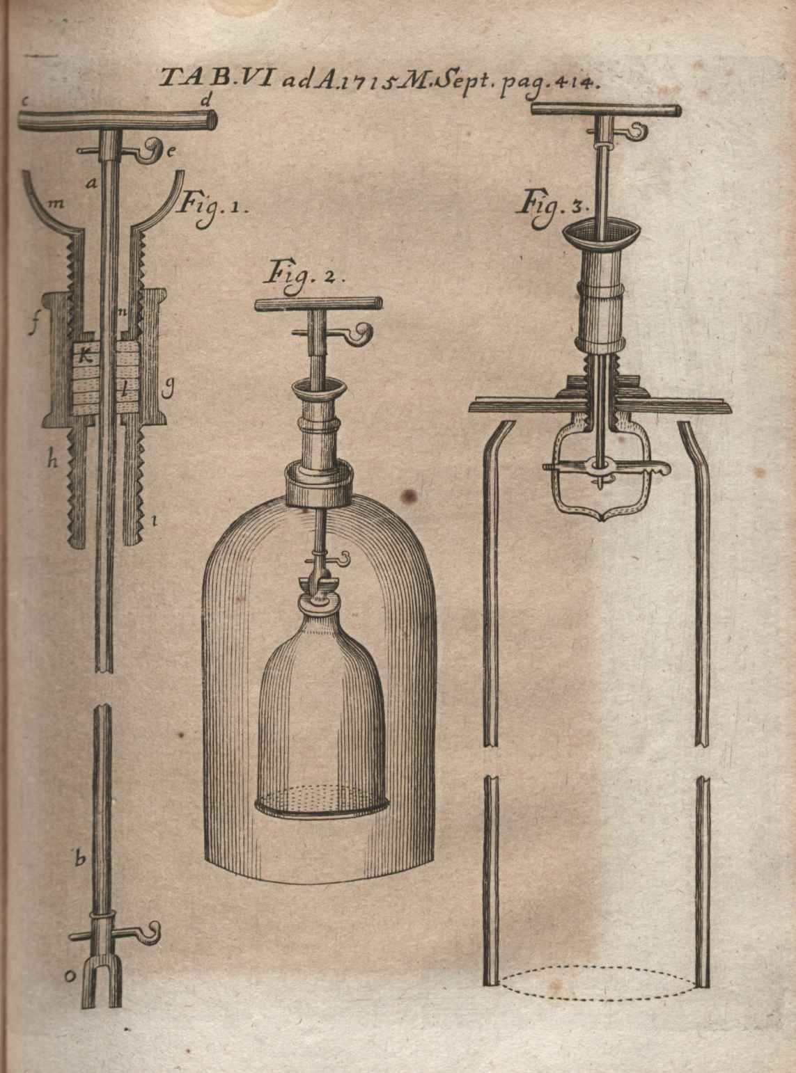 Illustration